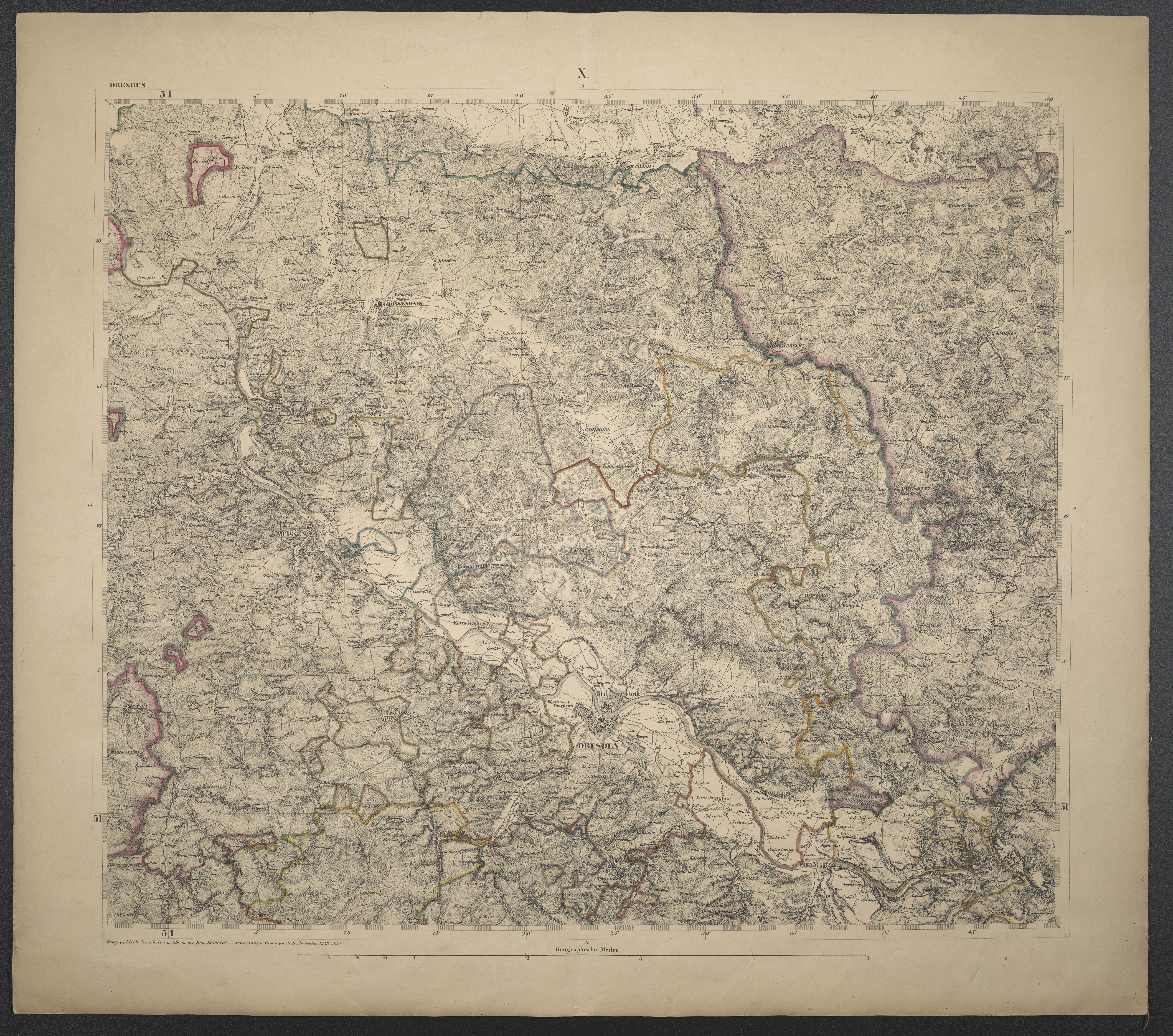 1 Kt. : Grenzen kolor. (52 x 45 cm); Koordinaten E 13°16'00"-E 14°08'00"/N 51°24'00"-N 50°55'00"; Aus: Charte des Koenigreichs Sachsen und der angrenzenden Laenderabtheilungen ; 10. - Maßstab in graph. Form (Geographische Meilen). - Titel links oberhalb des Kt.-Bildes. - Nummerierung oberhalb des Kt.-Bildes. - Relief: Schraffen